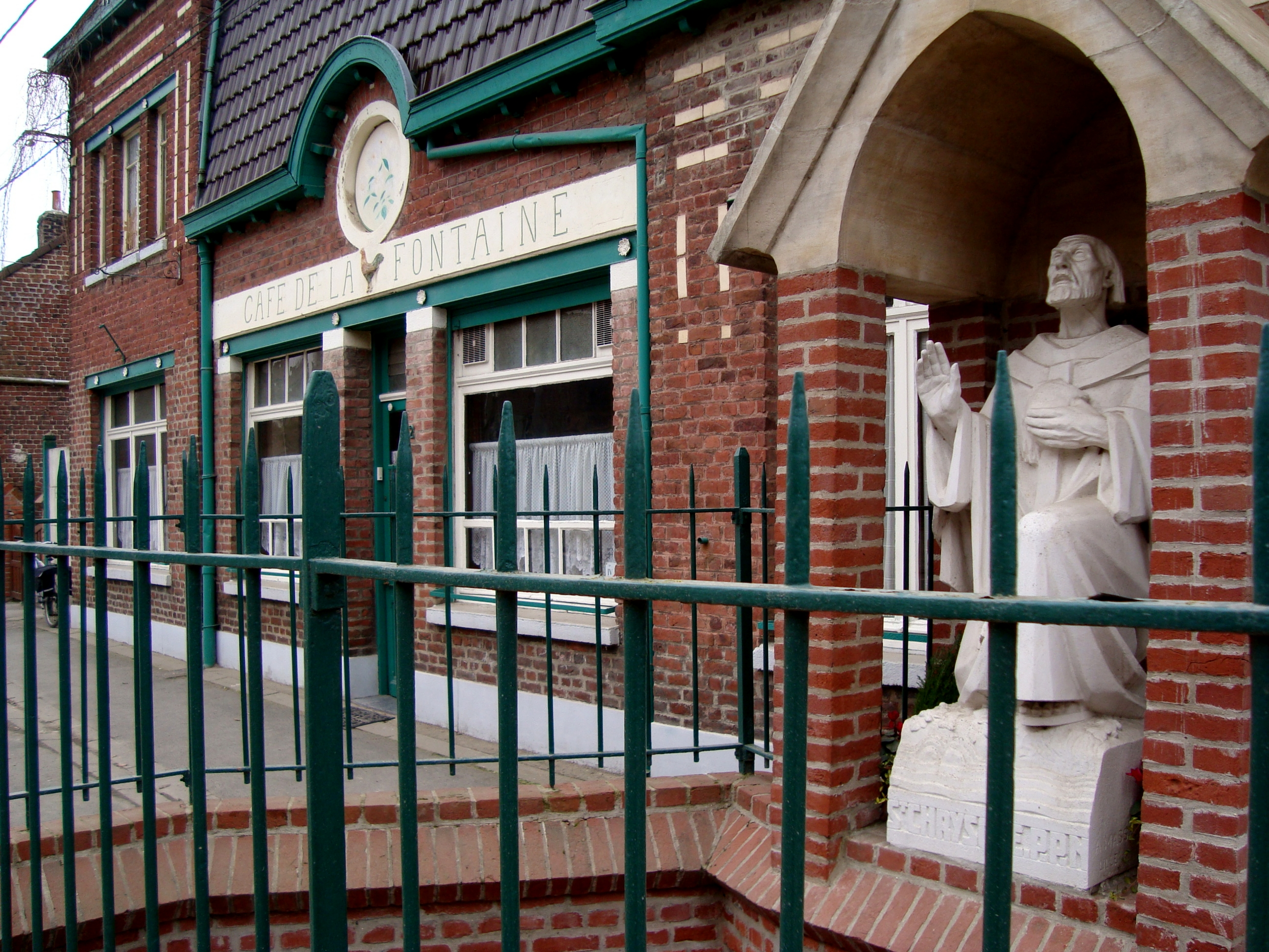 Fontaine miraculeuse de Saint-Chrysole à Verlinghem (Nord).